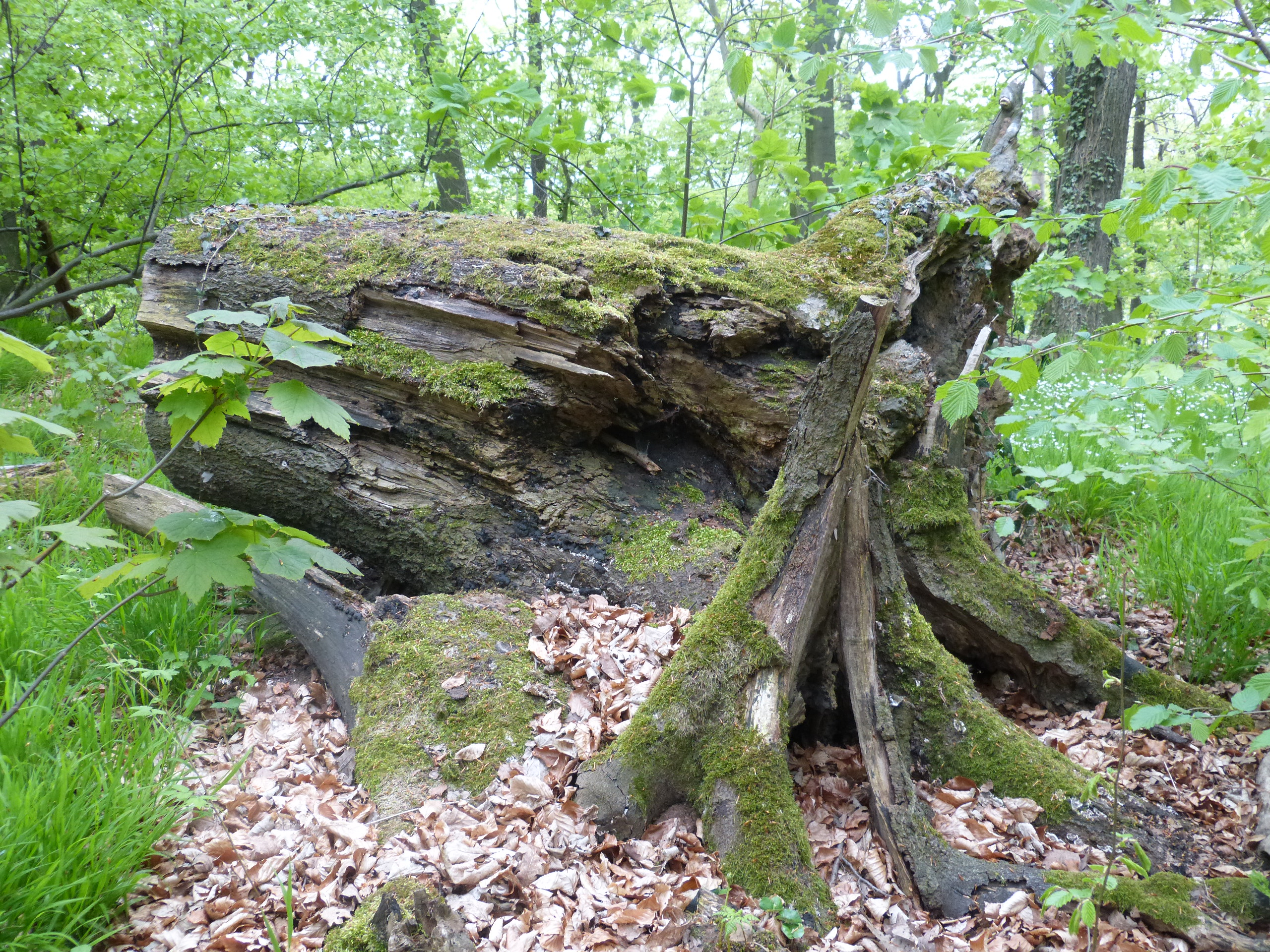 Totholz-Erhaltung im NSG Rothenberg in Menden